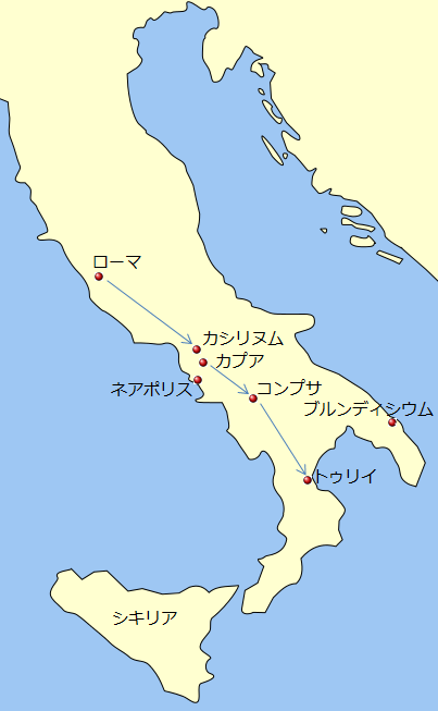 BC48年、マルクス・カエリウス・ルフスが起こした武装蜂起の関係図。矢印は、カエリウス自身のルート。